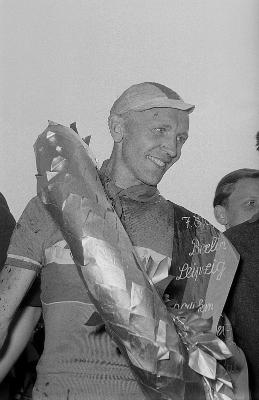 Original image description from the Deutsche Fotothek Portrait des Radrennfahrers Jan Vesely, Sieger der 7. Etappe Berlin–Leipzig der VII. Internationalen Friedensfahrt, mit Siegerkranz